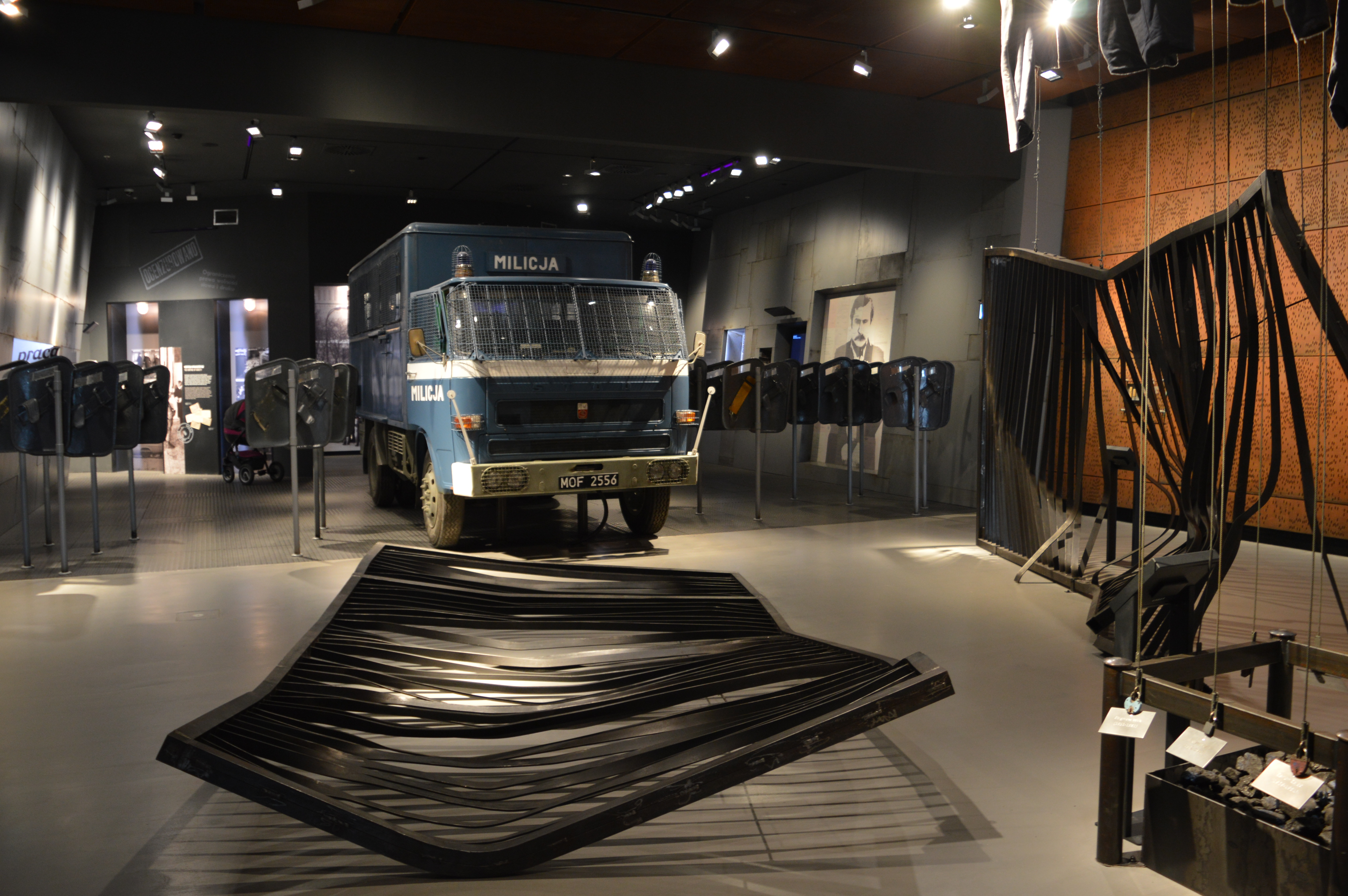 Europejskie Centrum Solidarności - sala D, brama rozbita przez milicyjny samochód